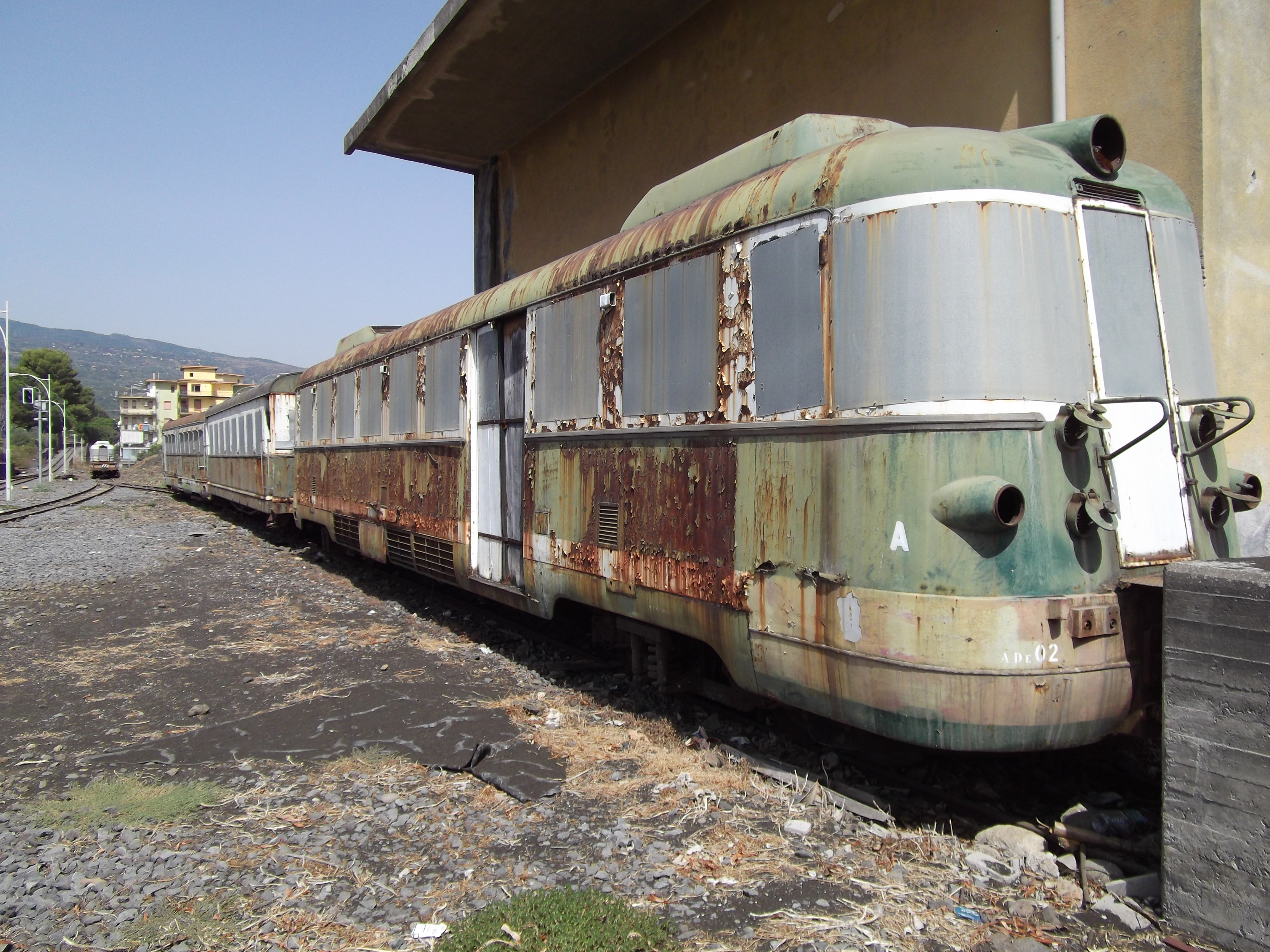 Automotrice ADe 02 accantonata nella stazione di riposto, in attesa di demolizione